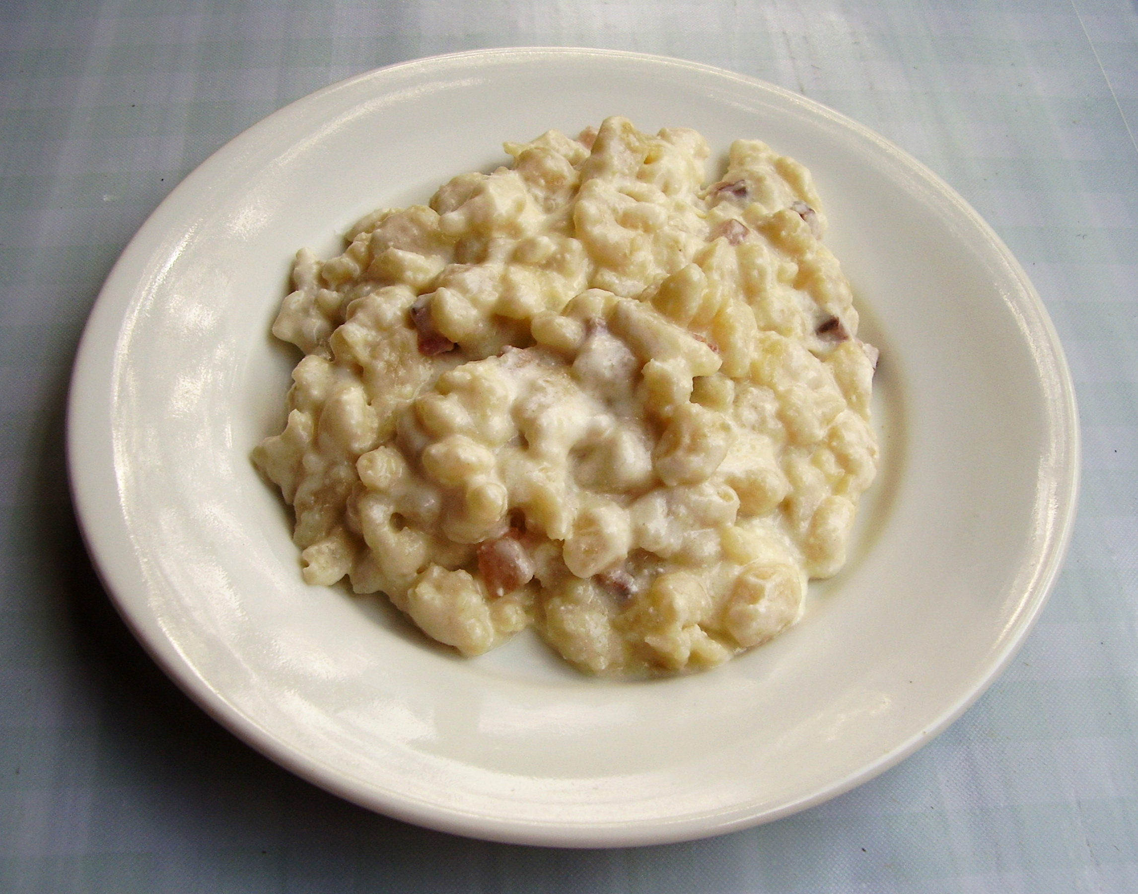 Halušky s brindzou, tradičné slovenské jedlo